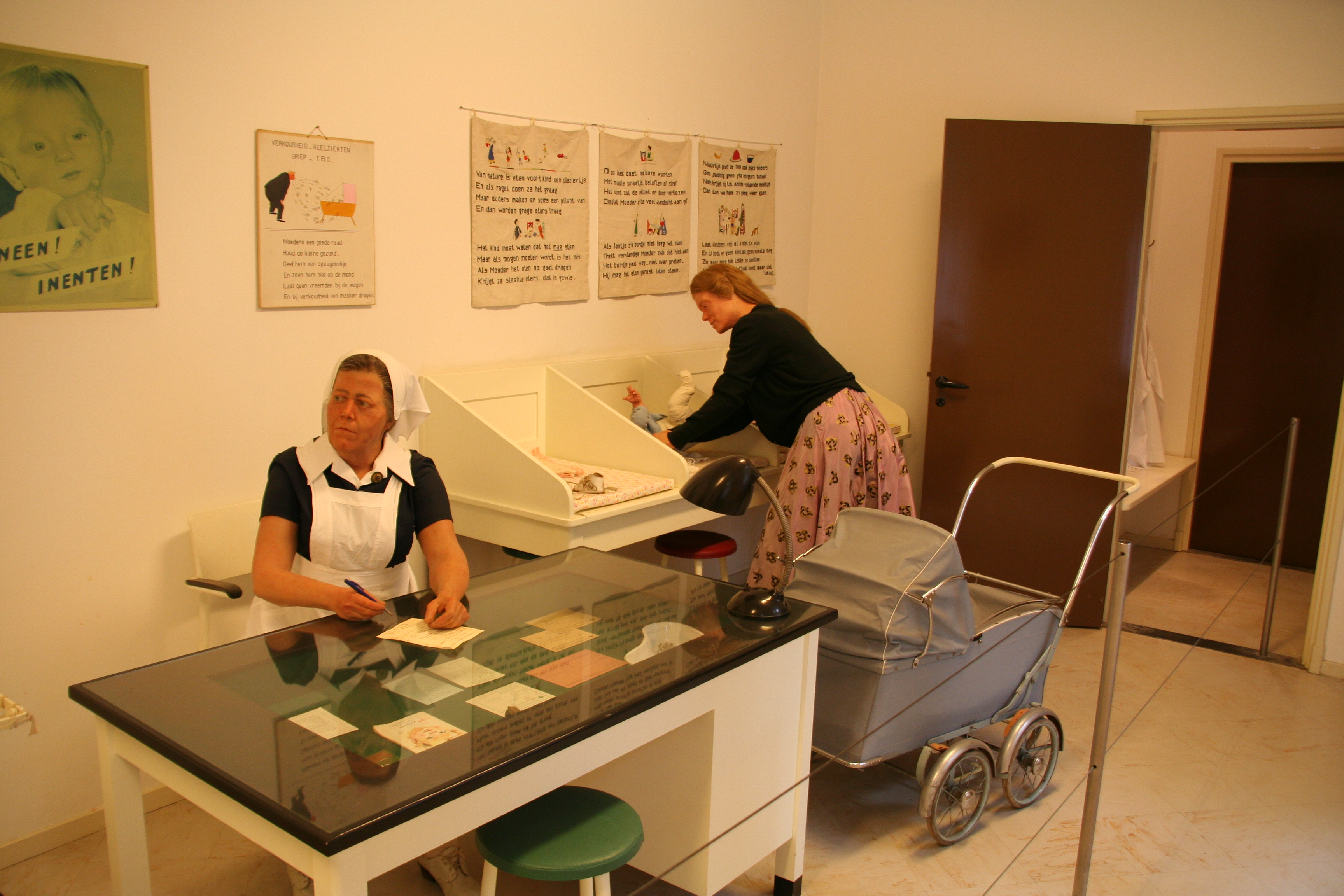 Verpleging - Groene Kruis -, te zien in het Nederlands Openluchtmuseum te Arnhem.